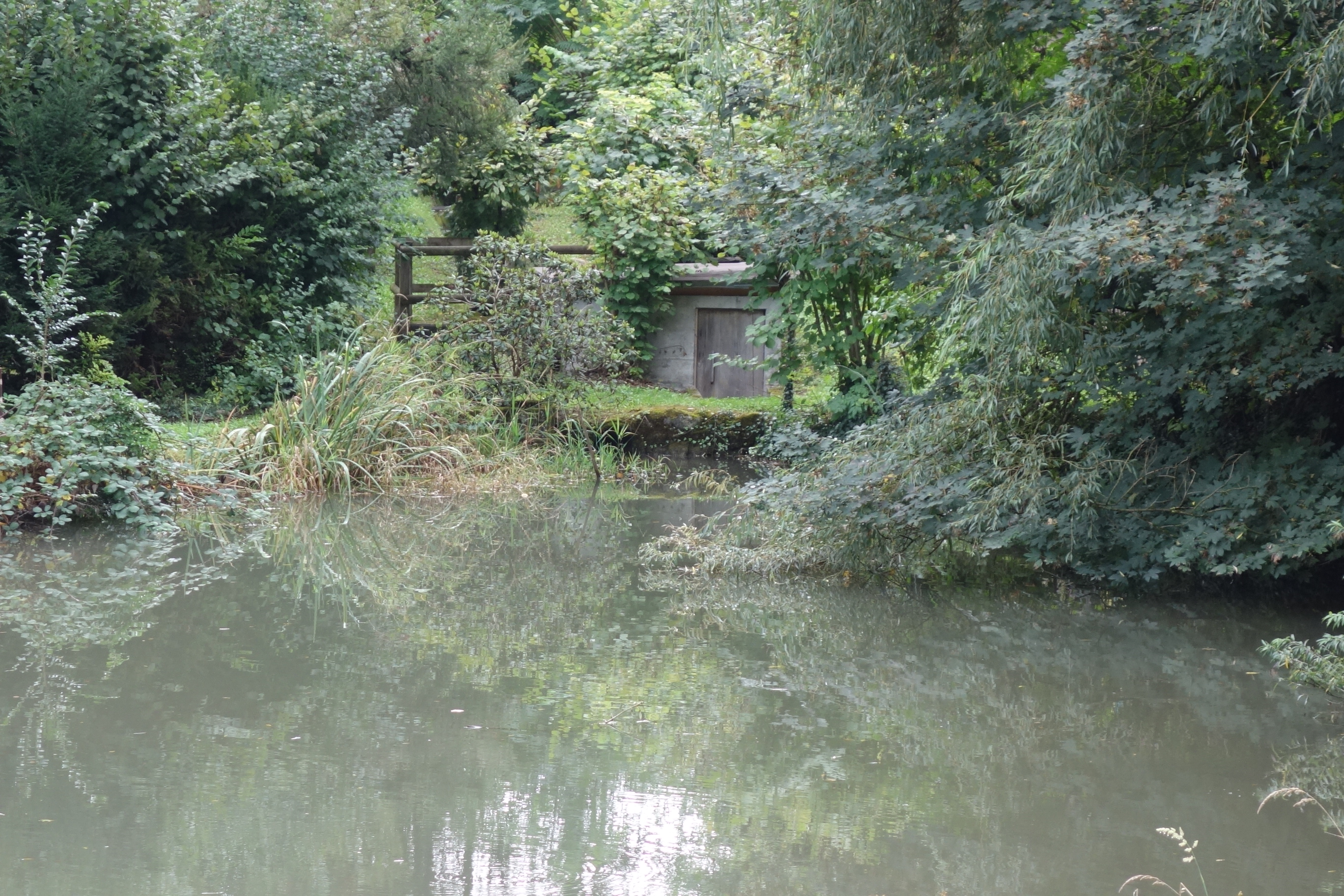 Kleinkraftwerk Umiker, Weiher Burgwies, Hirslanden, Zürich, Schweiz